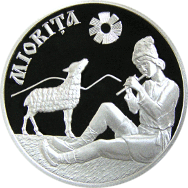 Реверс памятной монеты "160 лет со дня опубликования баллады Миорица"